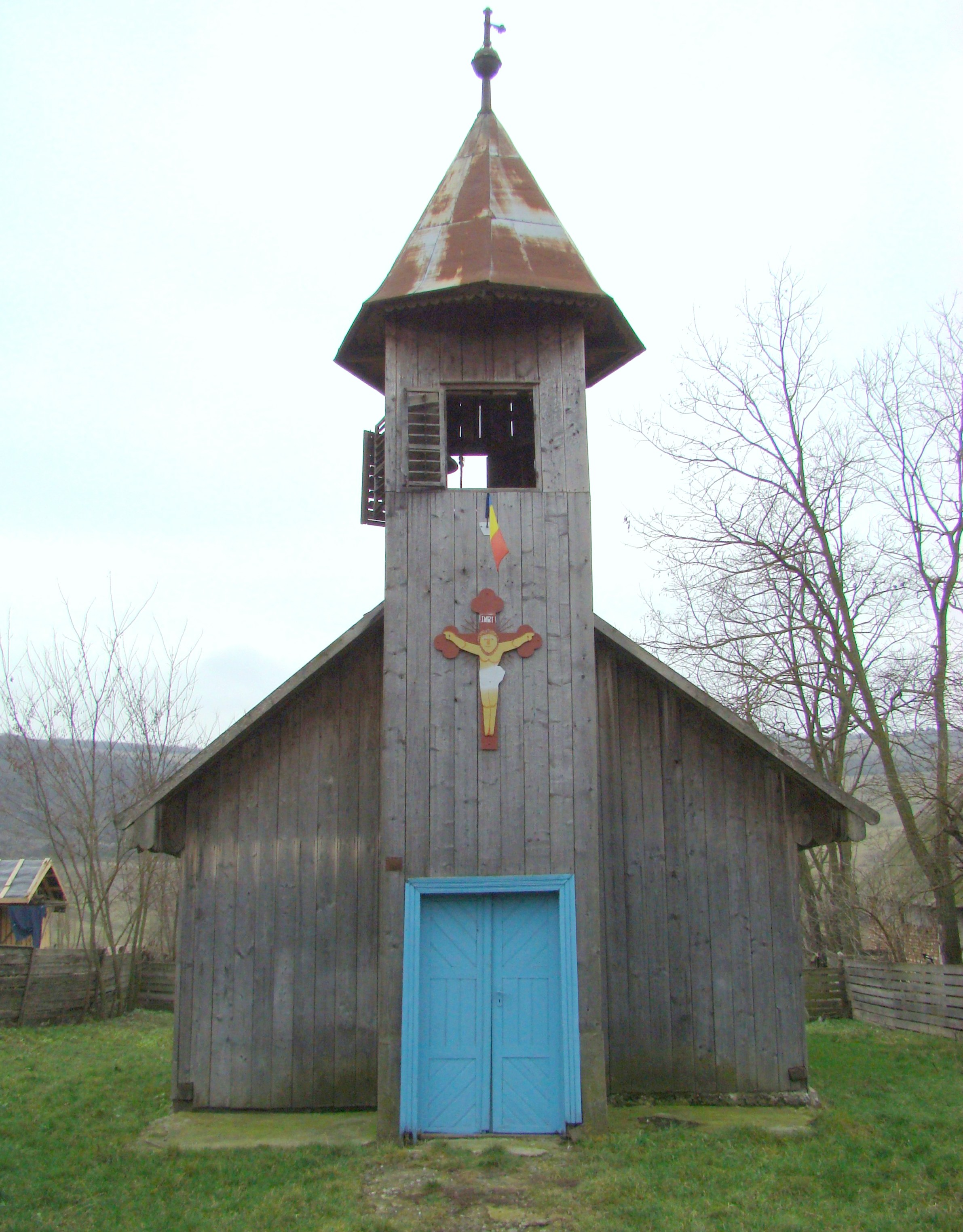 Biserica de lemn „Schimbarea la Față” din Țiptelnic, județul Mureș